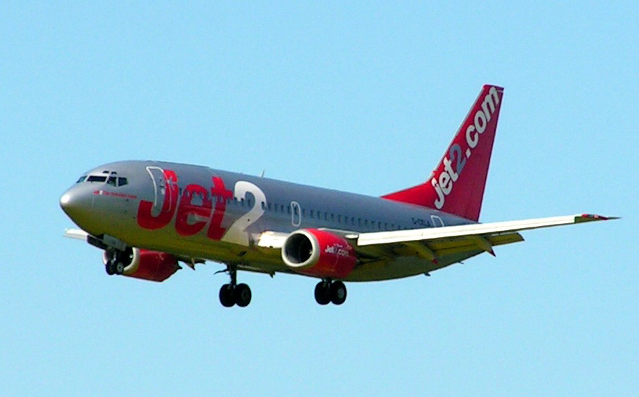 (del) (rev) 11:08, 5 June 2005 . . Colin Angus Mackay (114623 bytes) (The image is of a aeroplane coming into land at Edinburgh Airport in May 2005.